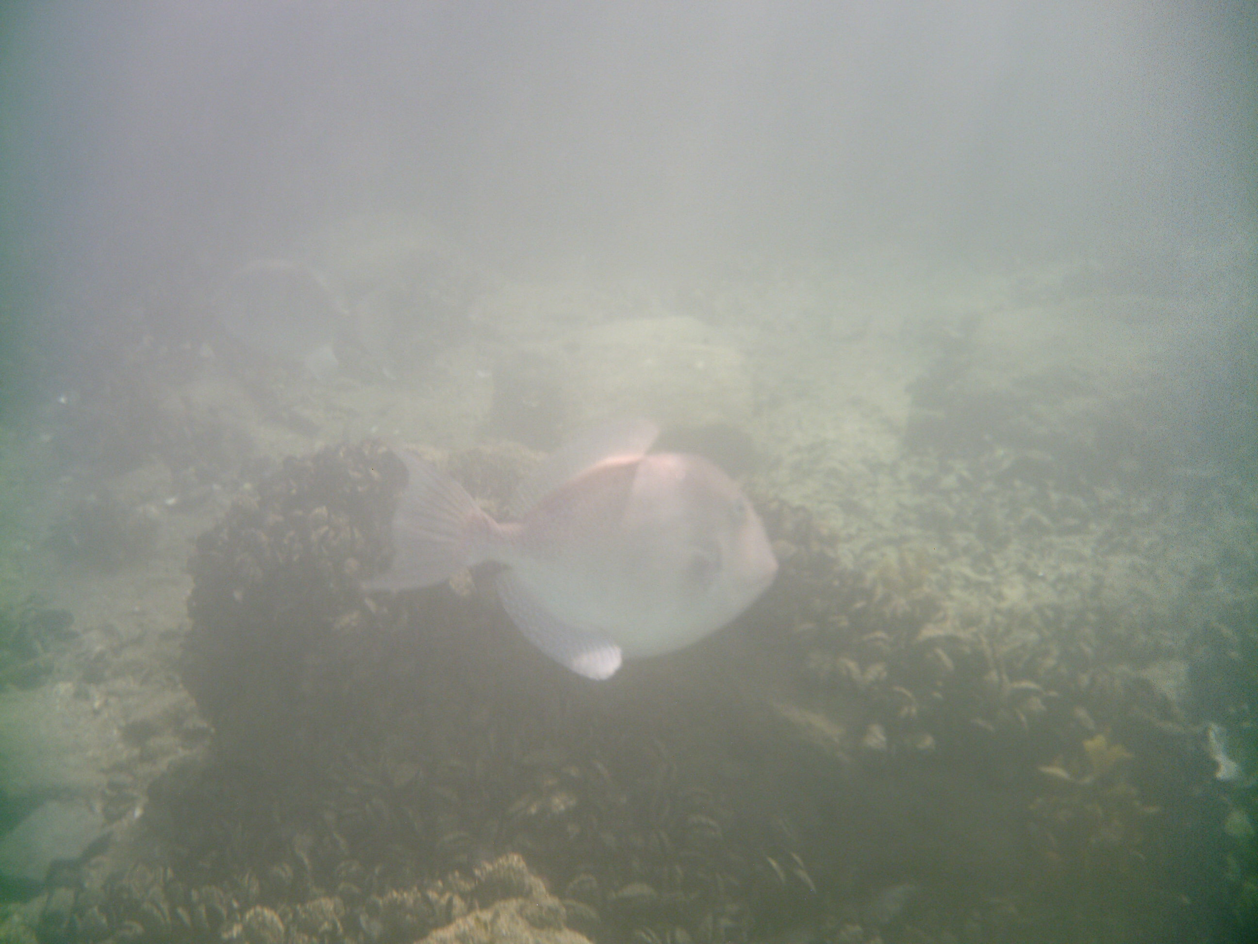 Porquiño ou roncón, visto en mergullo